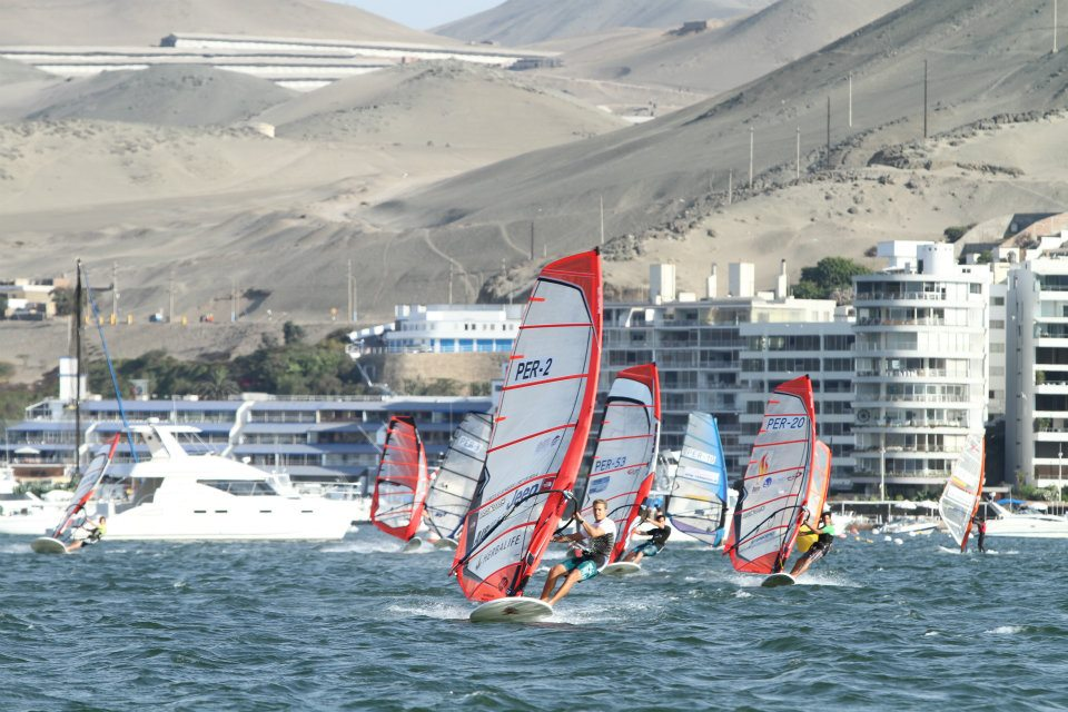 Ancón, sede de múltiples campeonato a vela. Créditos: RC-Pictures / Asociación Peruana de Windsurf